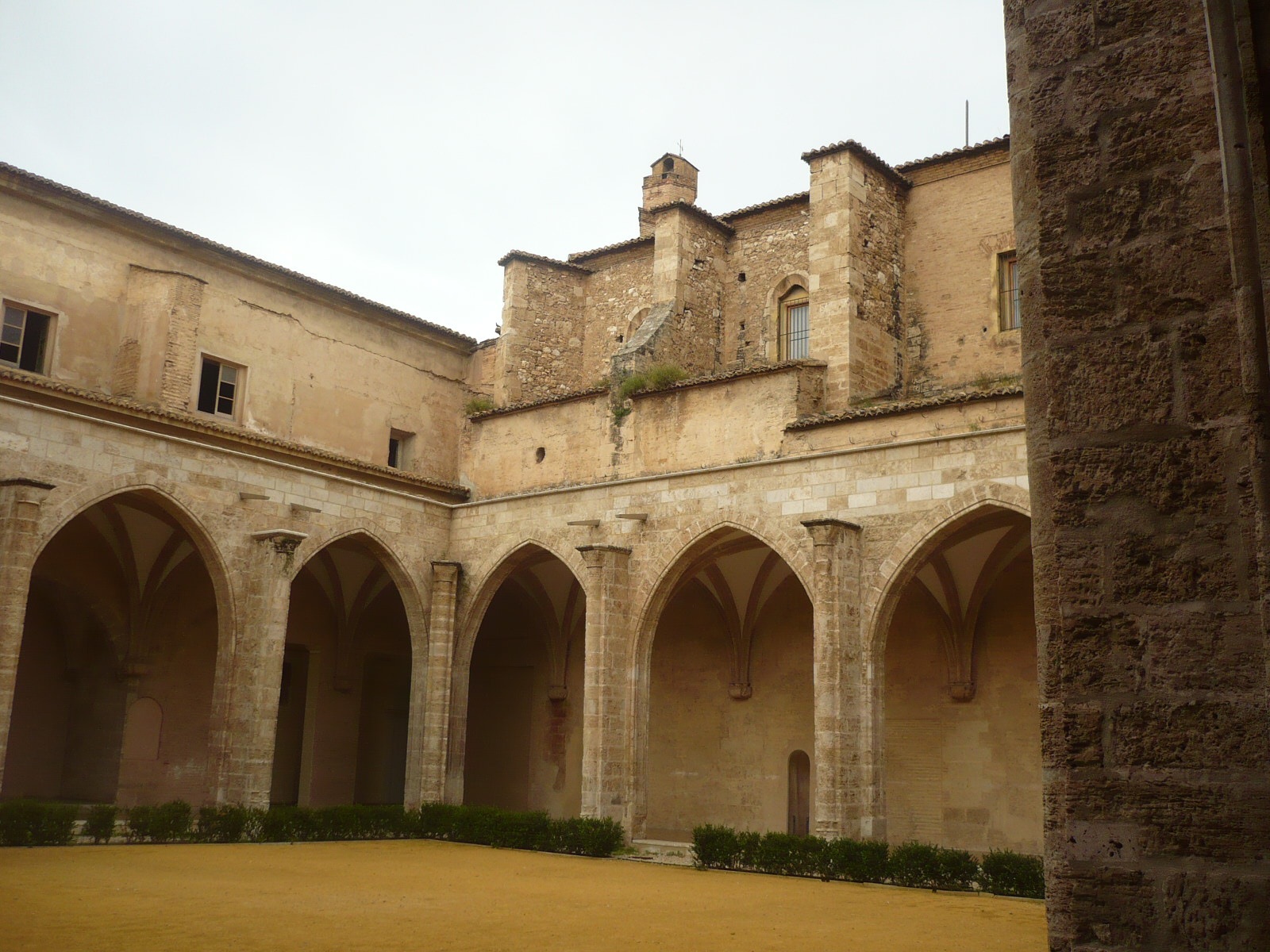 Claustro del Conento del Carmen de Valencia.